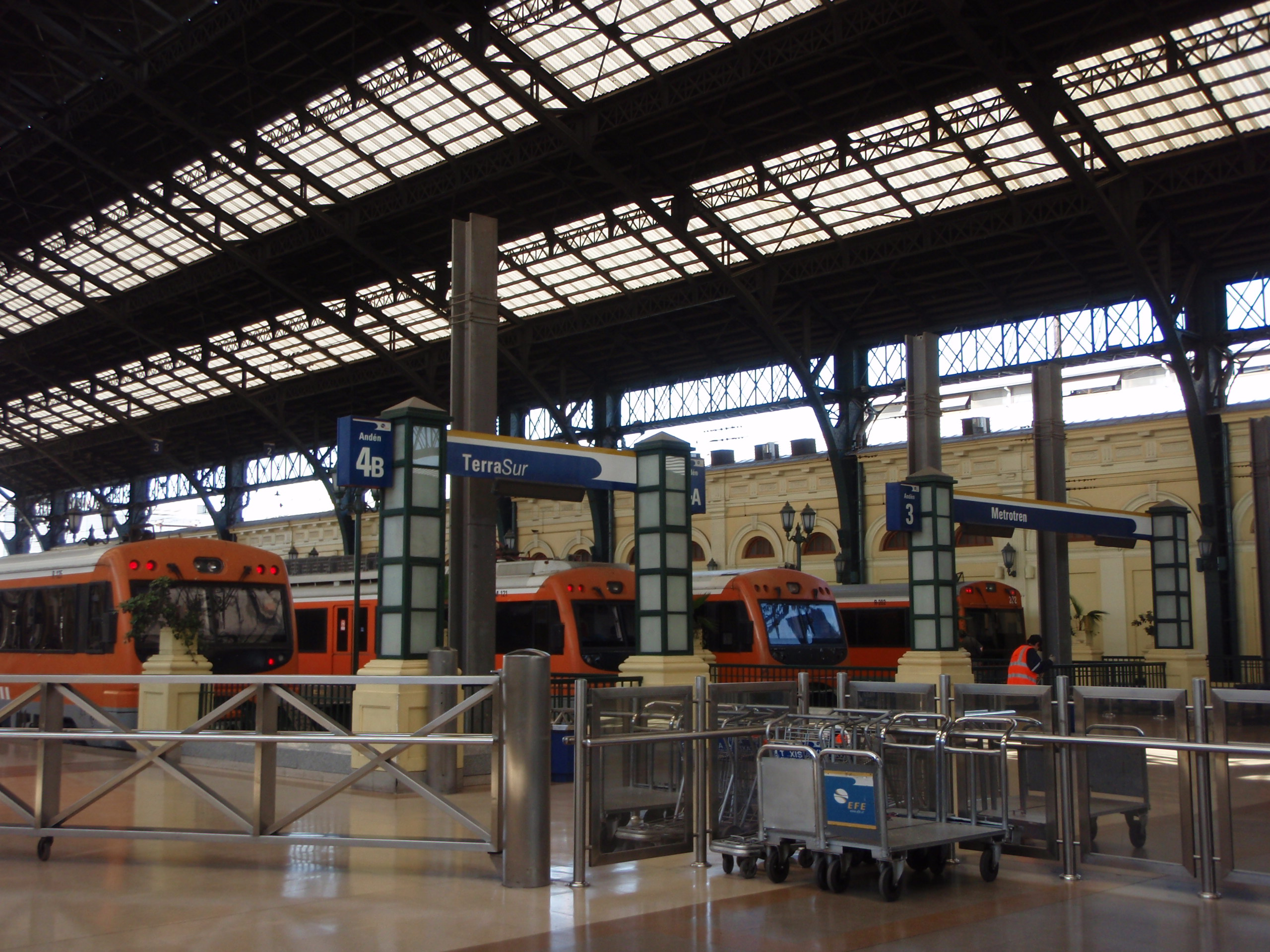 Estación Central de Ferrocarriles o Estación Alameda This is a photo of a national monument in Chile: 134